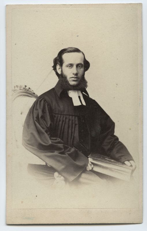 Portree: Alexander Hörschelmann (1836–1885), alates 1864 Hageri Lambertuse koguduse õpetaja